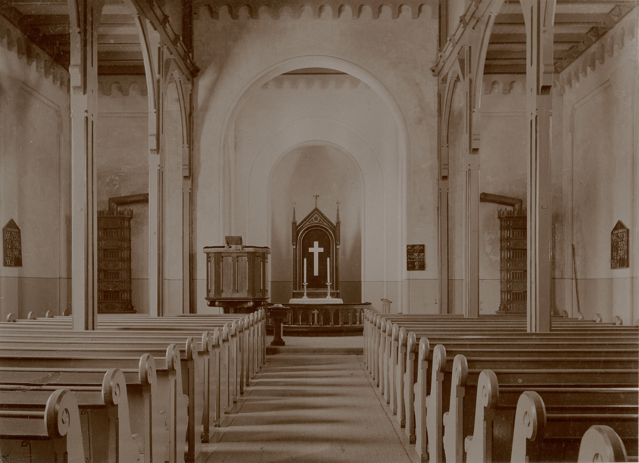 Interiør i Furuset kirke (Ullensaker) før den fikk dagens altertavle. Fra Kulturminnebilder.no.